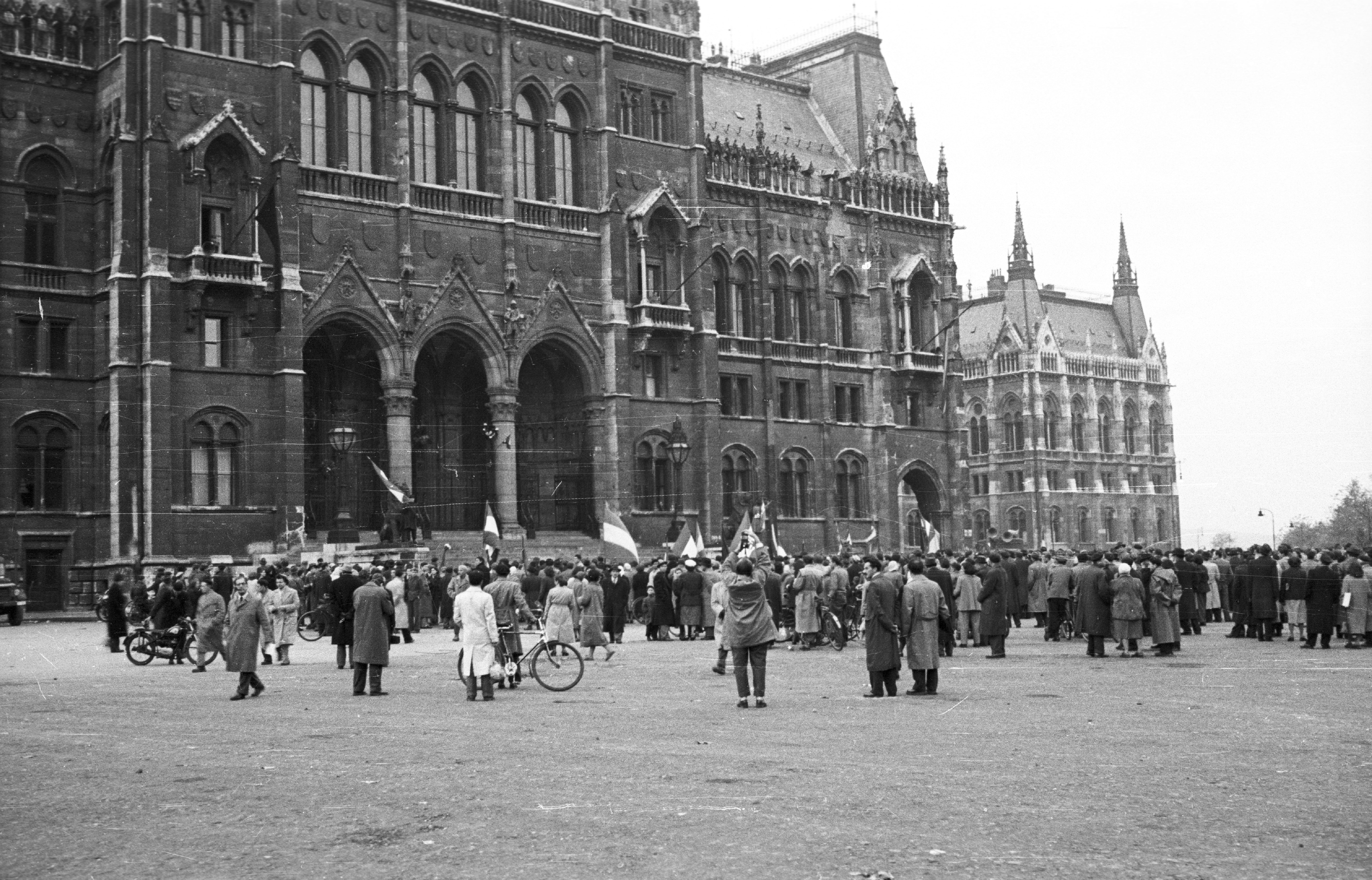 Kossuth Lajos tér, Parlament. Location: Hungary, Budapest V. Tags: flag, bicycle, motorcycle, Budapest, revolution Title: Kossuth Lajos tér, Parlament.